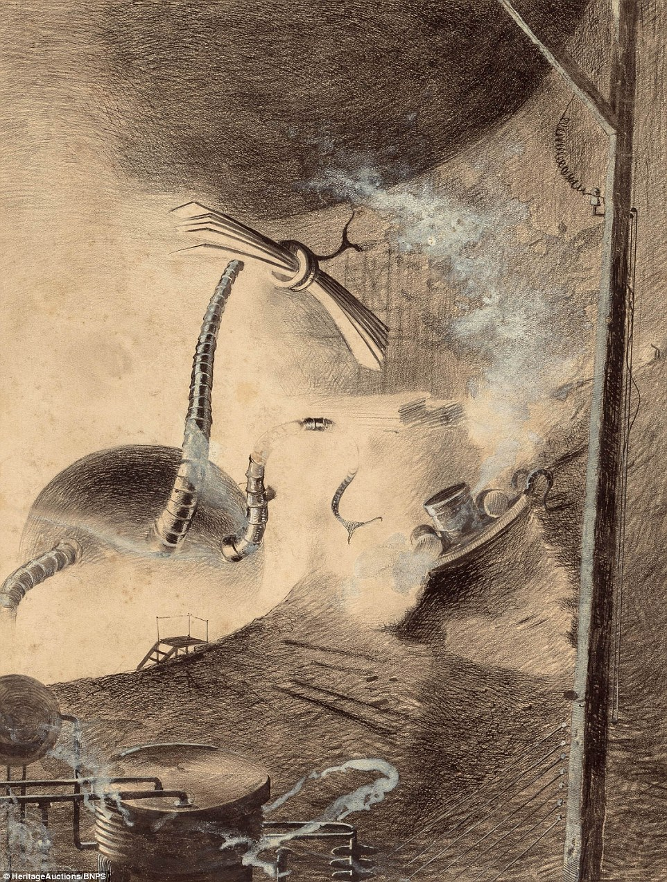 This drawing of a martian destroying an urban centre was drawn by Henrique Alvim Correa for the french edition of the science fiction Book The War of The worlds